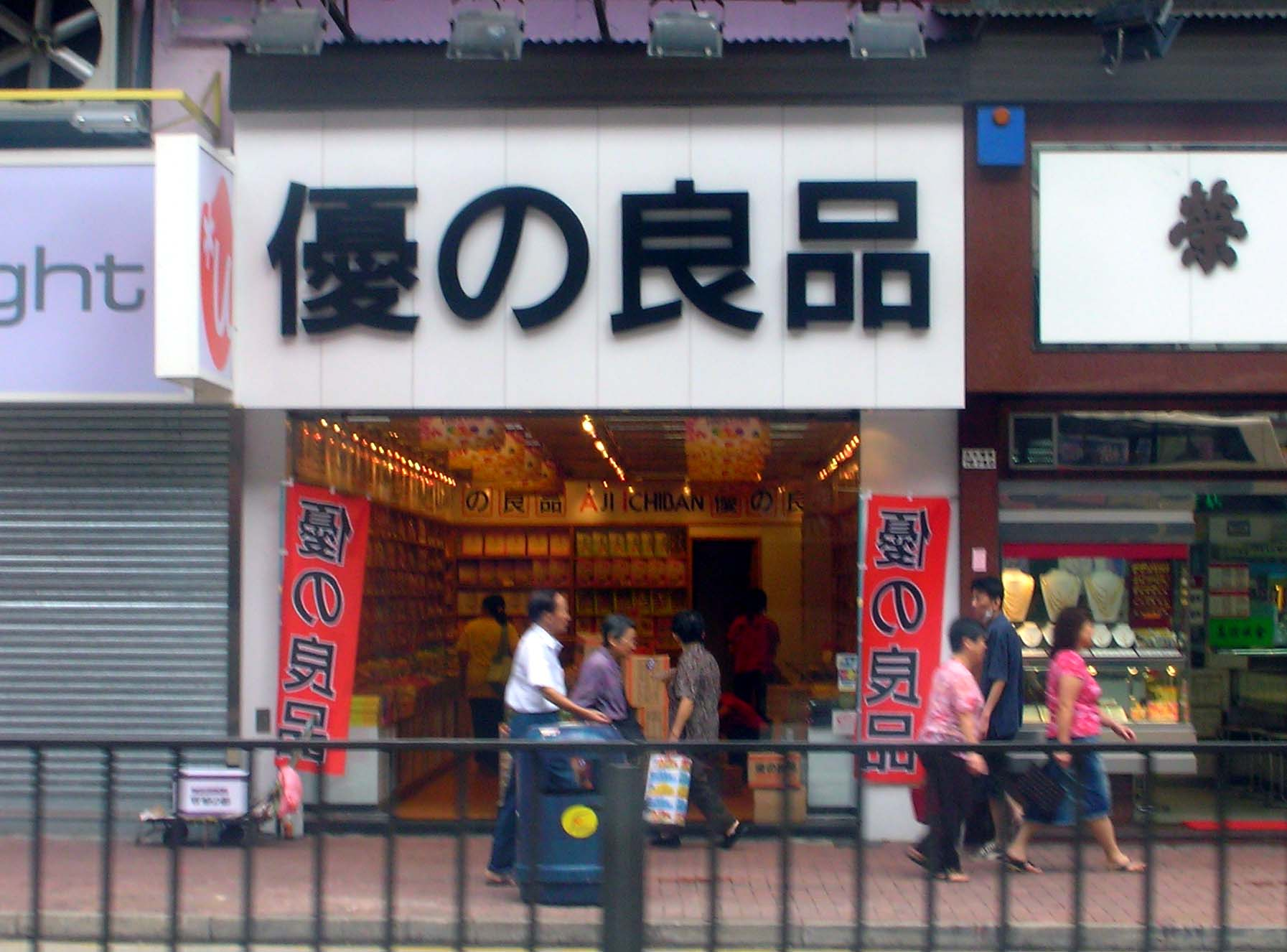 Aji Ichiban Outlet at Tokwawan, Hong Kong 優之良品位於香港土瓜灣的分店